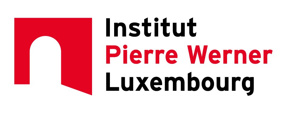 Nouveau logo de l'Institut Pierre Werner